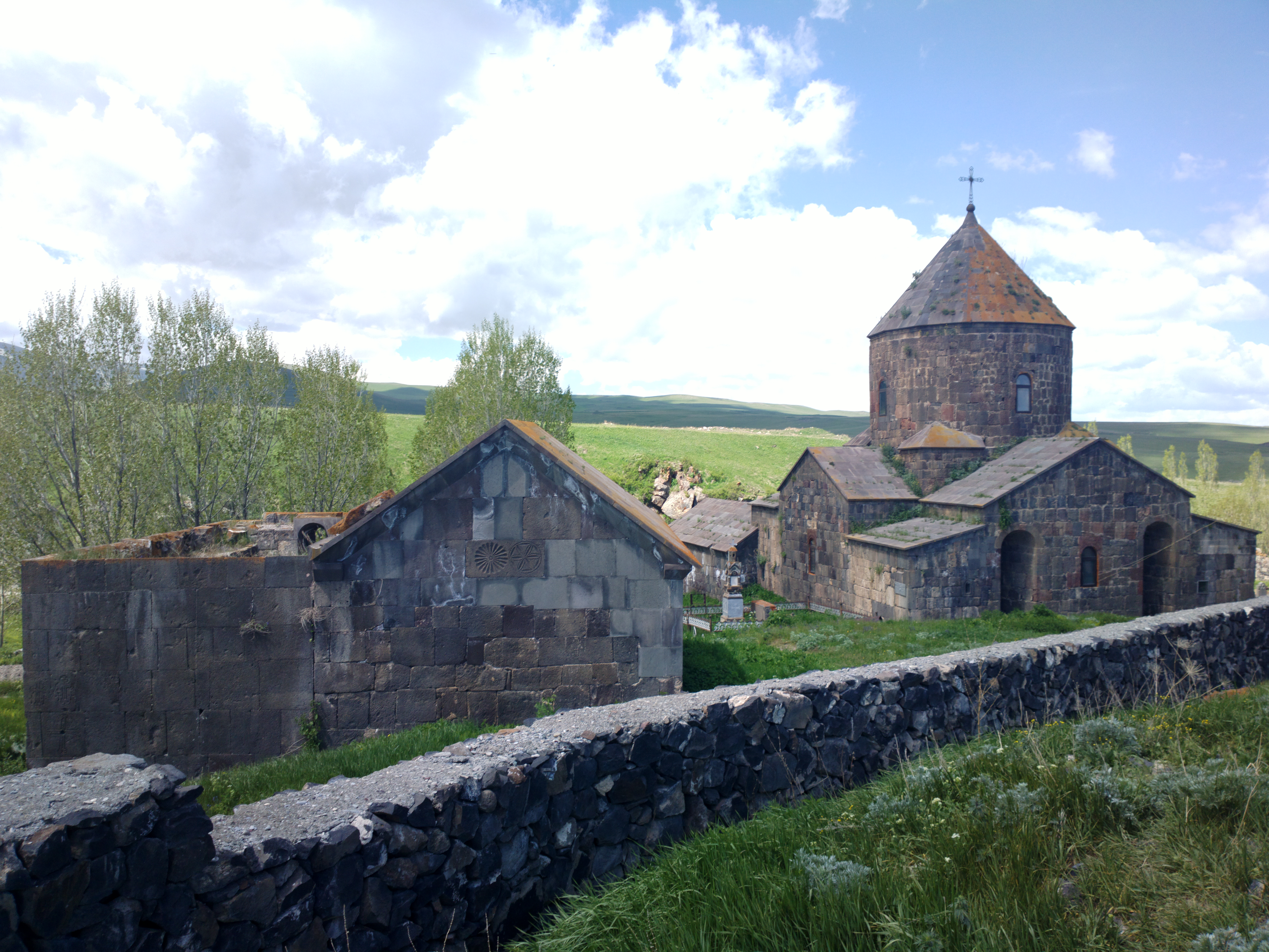 Մաքենյաց վանք 64/9